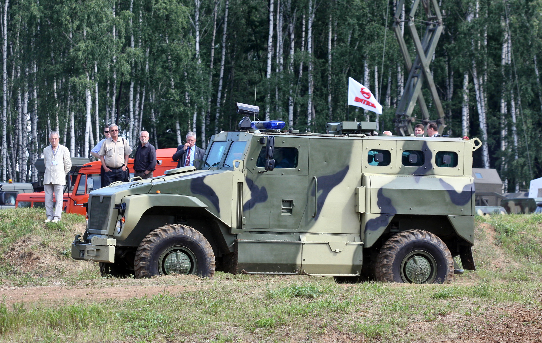 ВПК--3924